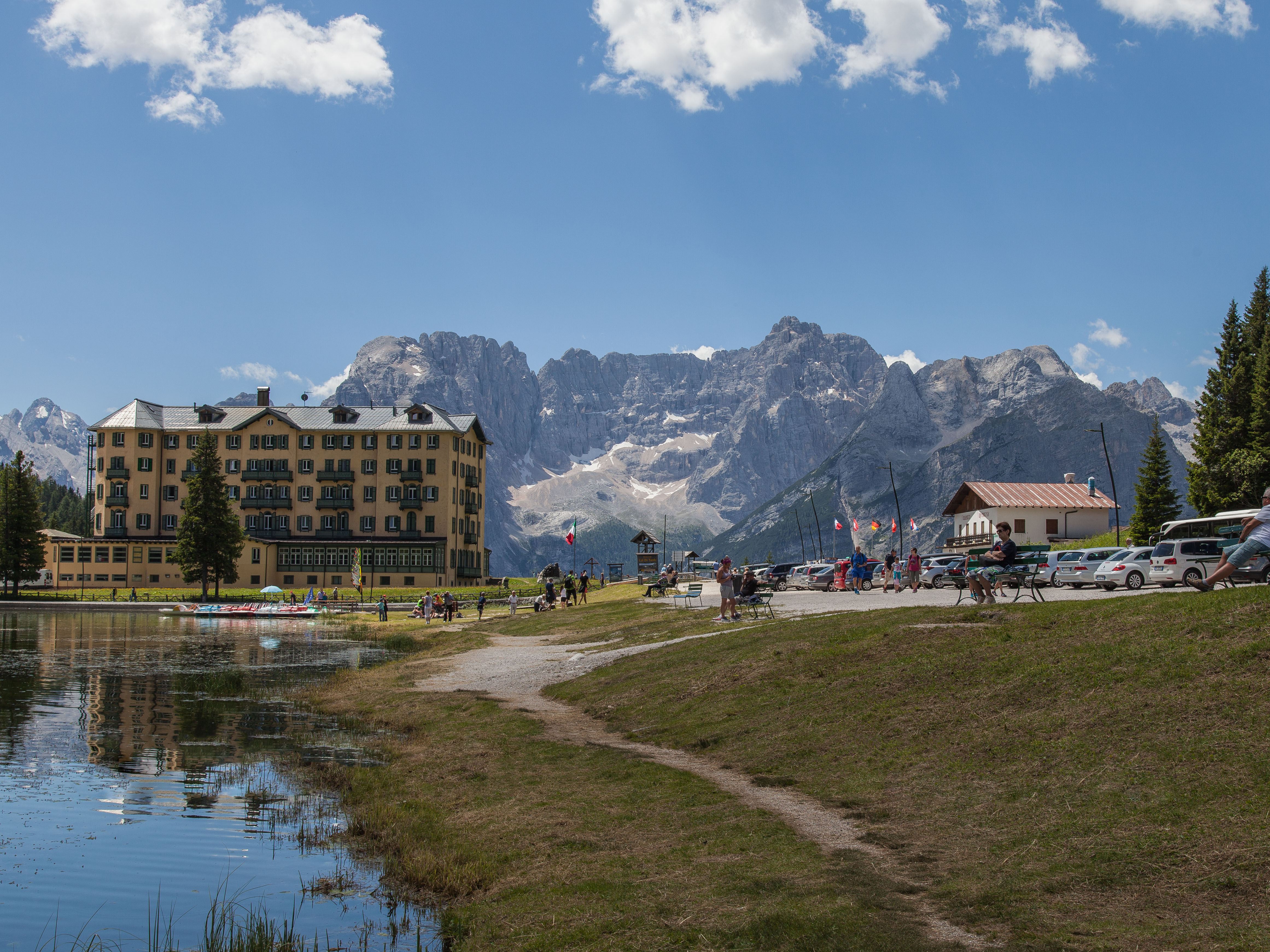 Misurinasee - Kinderheim Pio XII und Sorapis.Gruppe